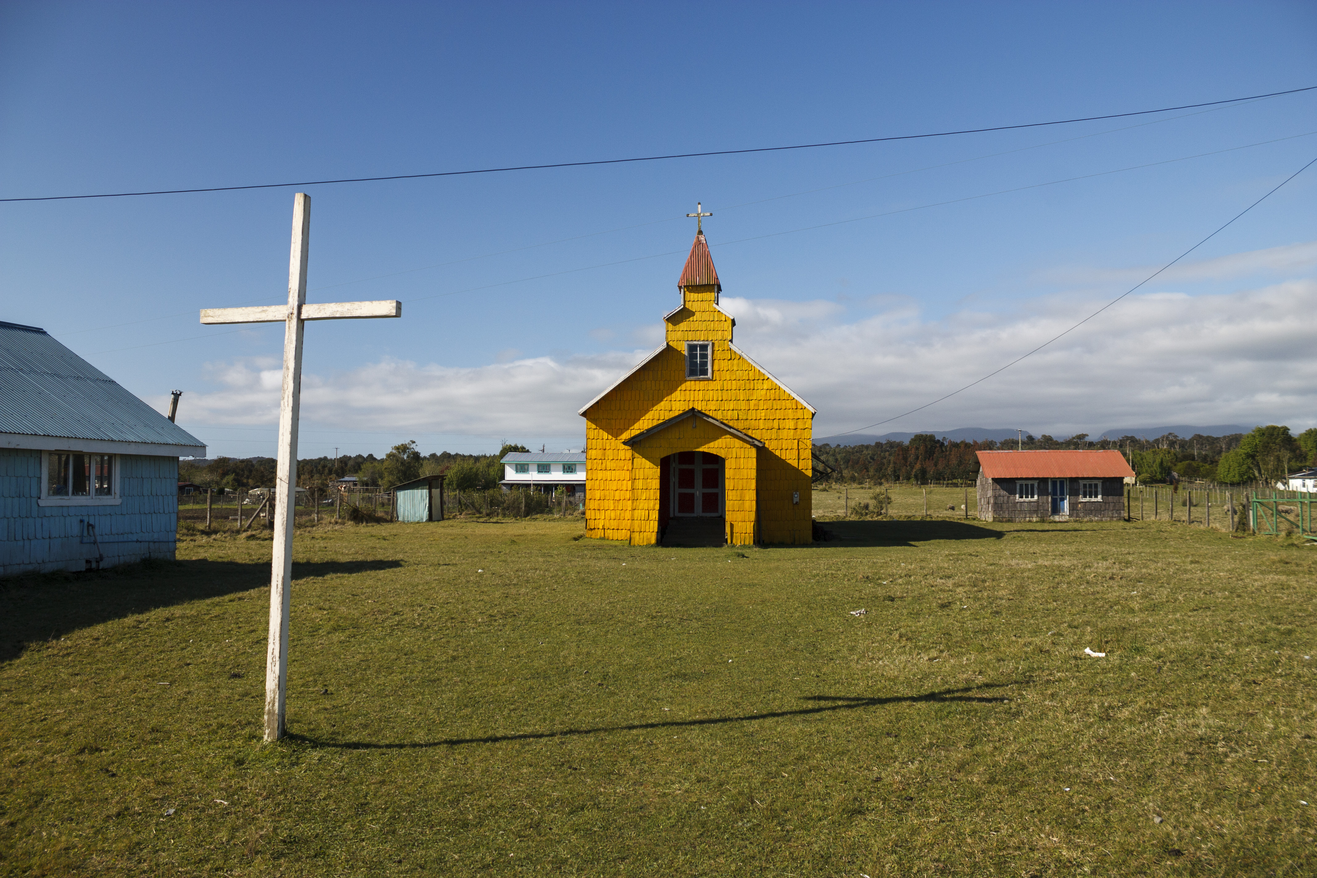 Iglesia de Lleguimán, Hualaihué, Chile. (2011)